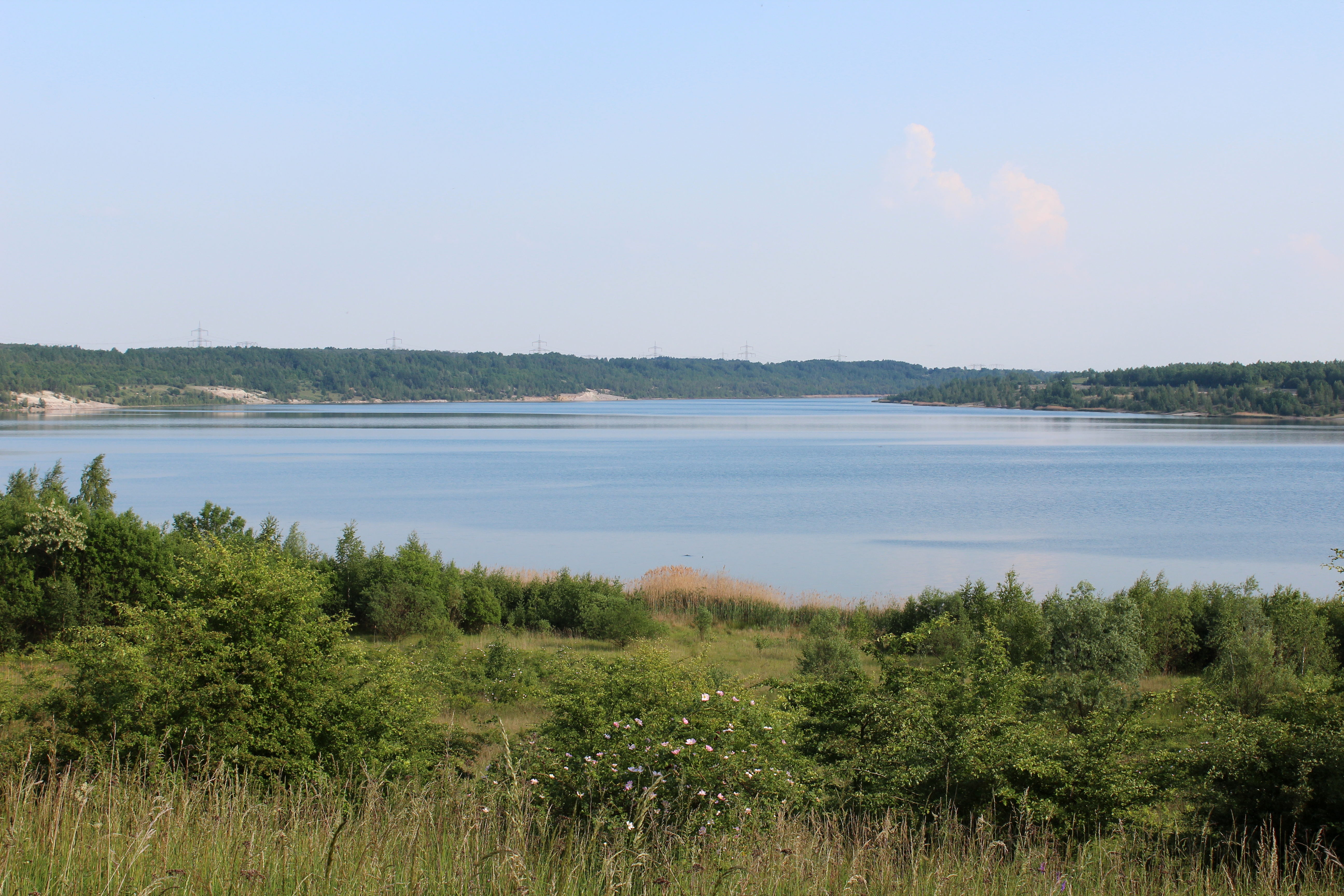 Bockwitzer See